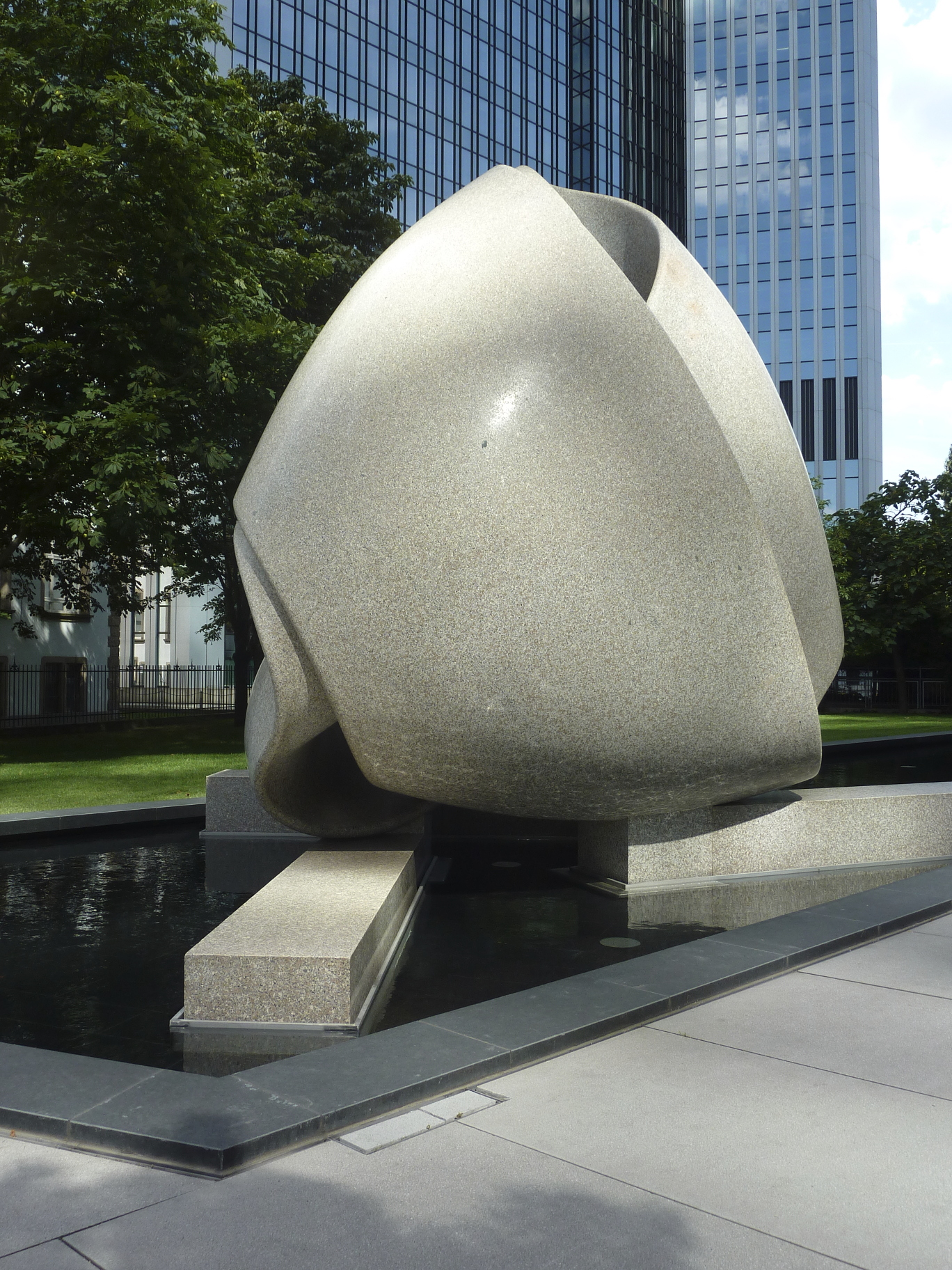 Kontinuität (auch „Koloss von Frankfurt“) ist eine 1986 vollendete Skulptur des schweizer Bildhauers Max Bill (1908–1994). Das Kunstwerk, das mit 80 Tonnen Gewicht zu den schwersten Granitskulpturen der Welt zählt, steht in der deutschen Stadt Frankfurt am Main an den Hochhaus-Zwillingstürmen der Deutschen Bank. In den Jahren 2007 und 2011 wurde die Skulptur jeweils um einige Meter von ihrem ursprünglichen Standort im Vorhof der beiden Hochhäuser versetzt; Ihr gegenwärtiger Standort ist eine Grünanlage neben der Deutsche-Bank-Zentrale